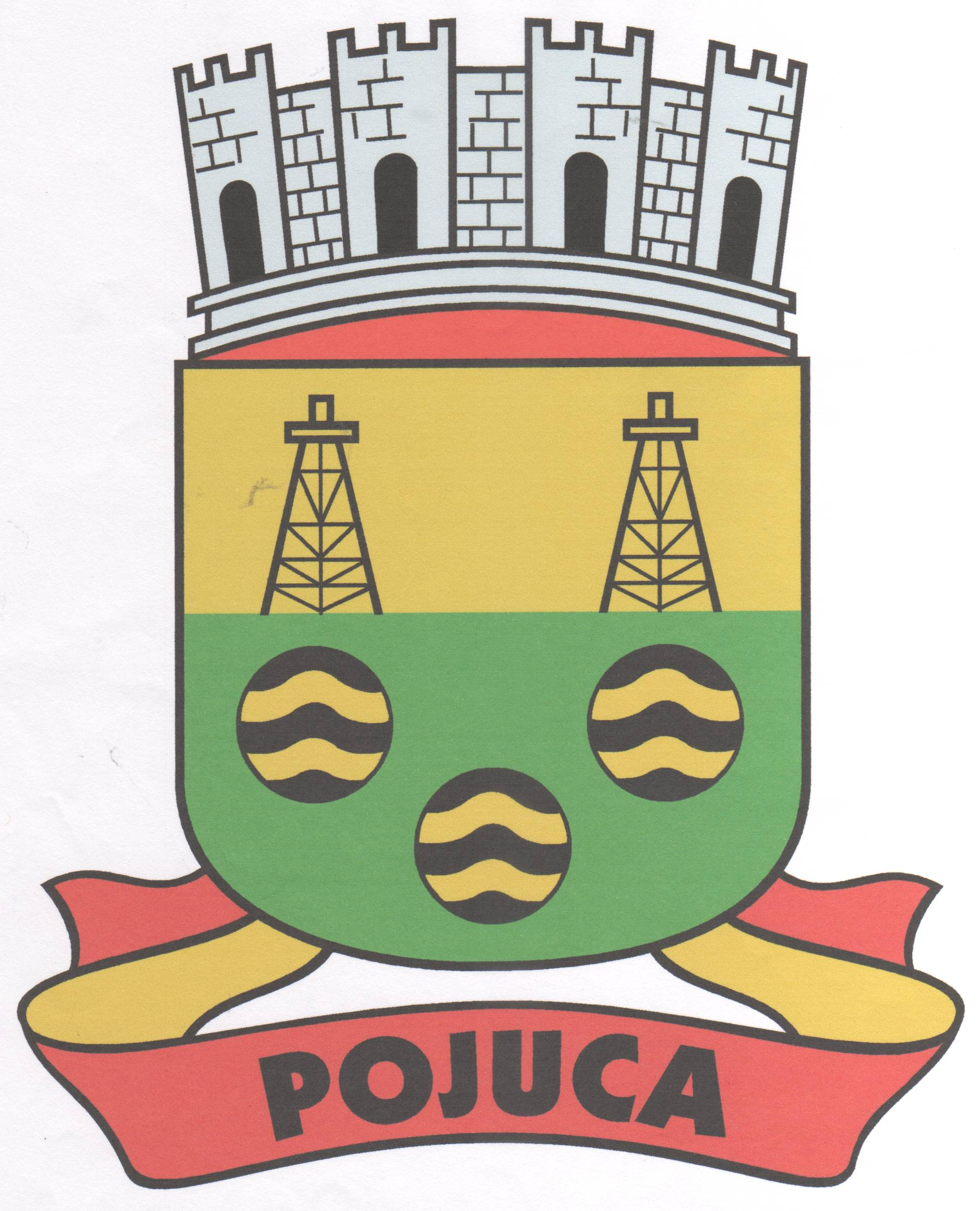 Imagem do Brasão que representa o Município de Pojuca, um dos municípios baianos. Esta imagem foi criada pelos governantes da cidade de Pojuca por volta de 1940 juntamente com a bandeira do município.